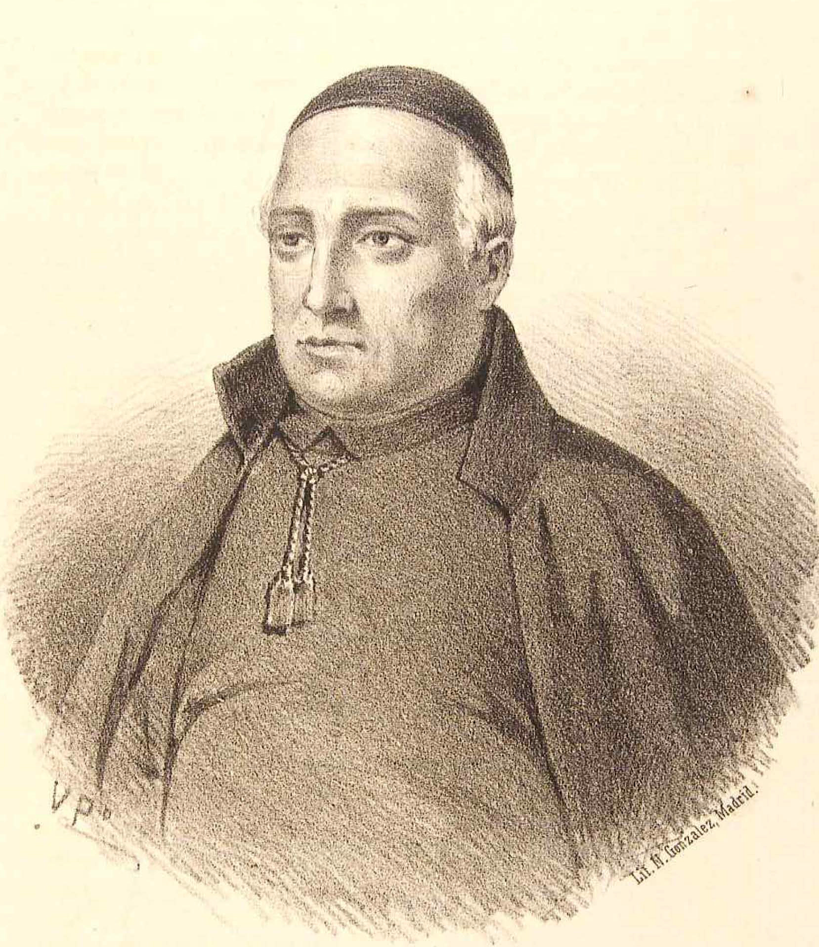 Diego Muñoz-Torrero (1761-1829)